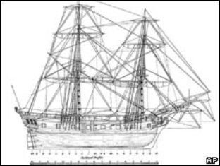 Royal Navy sailing ship Ontario.